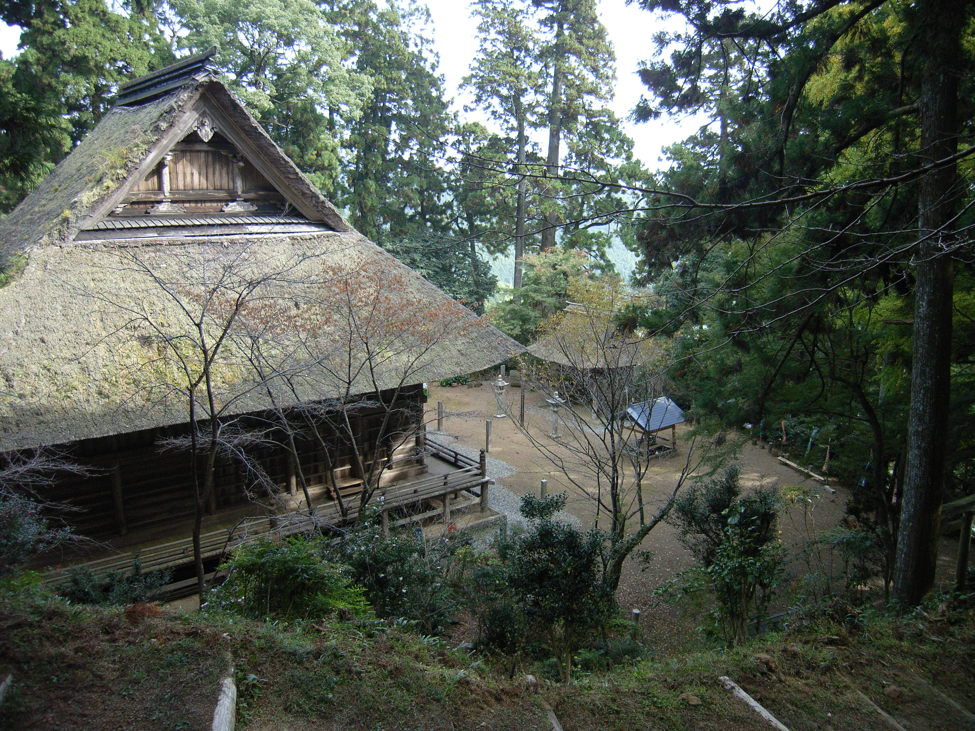 千葉山 智満寺 境内